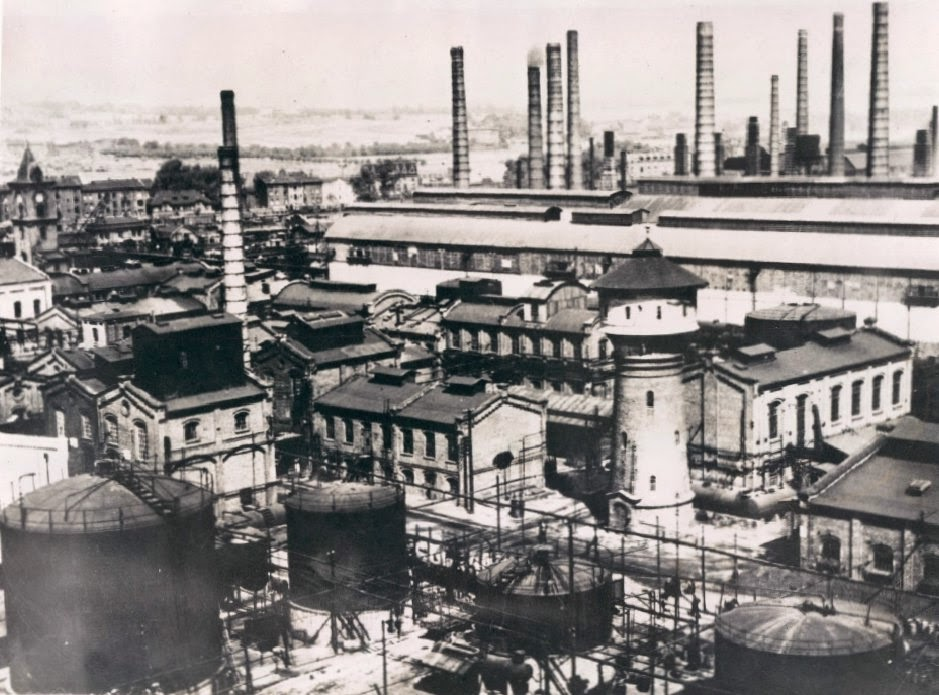 zakłady koksochemiczne w Chorzowie-Batorym (późniejsze Zakłady Chemiczne Hajduki przy ul. Stalowej), w tle Huta Batory